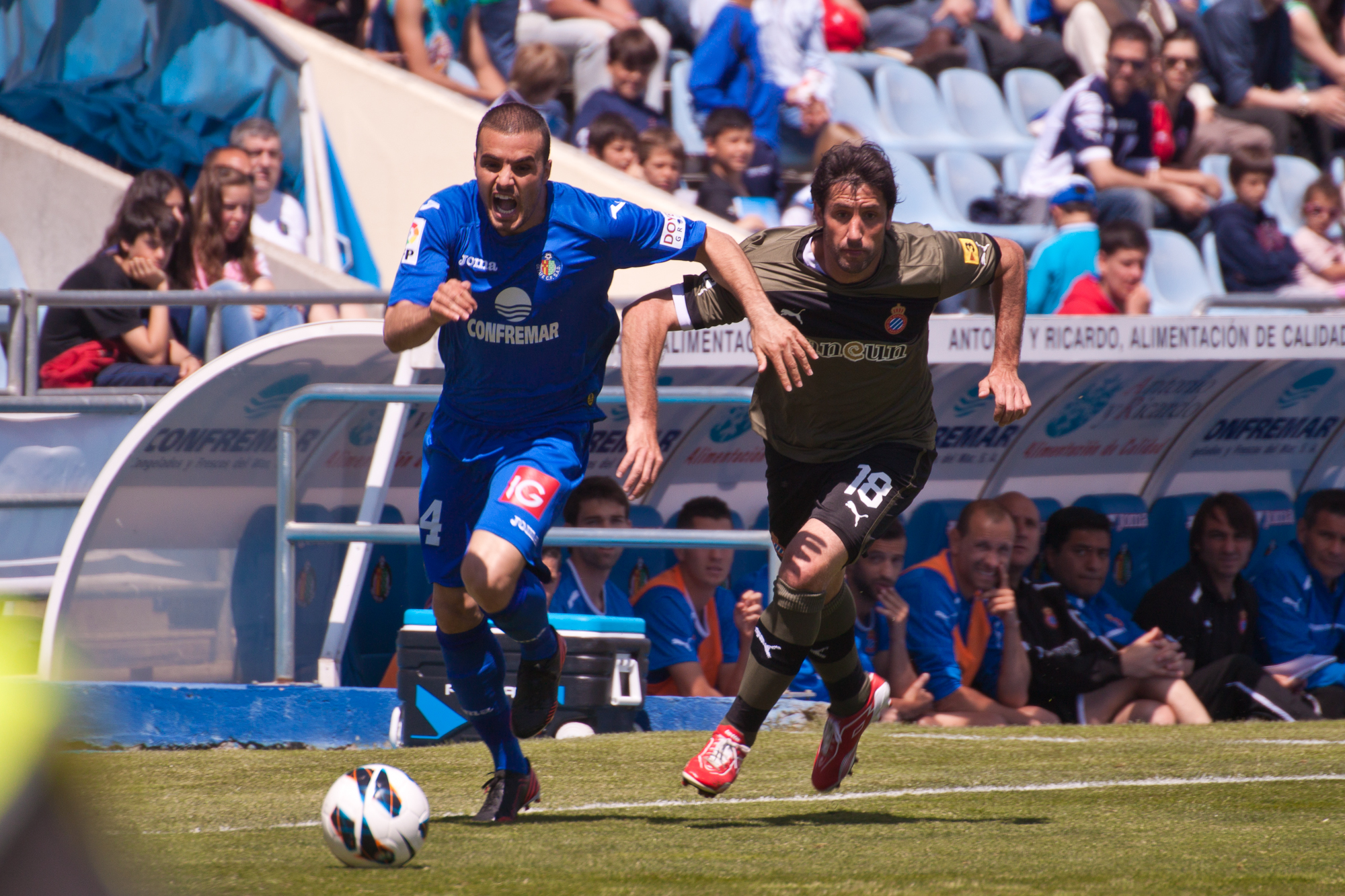 Izquierda (Getafe C.F.): Pedro León Sánchez Gil (Mula, Murcia, España 24 de noviembre de 1986) es un jugador de fútbol. Juega habitualmente de mediocampista. Derecha (R.C.D. Español): Joan Capdevila Méndez (Tárrega, Lérida, España, 3 de febrero de 1978) es un futbolista español. Juega de lateral izquierdo. Partido celebrado el 21-04-2013 entre el Getafe C.F. - R.C.D. Español correspondiente a La Liga.